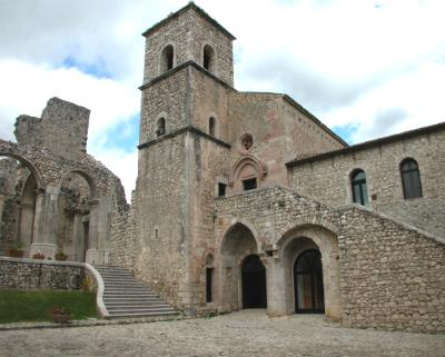 Abadia de Goleto (Campania, Italia)